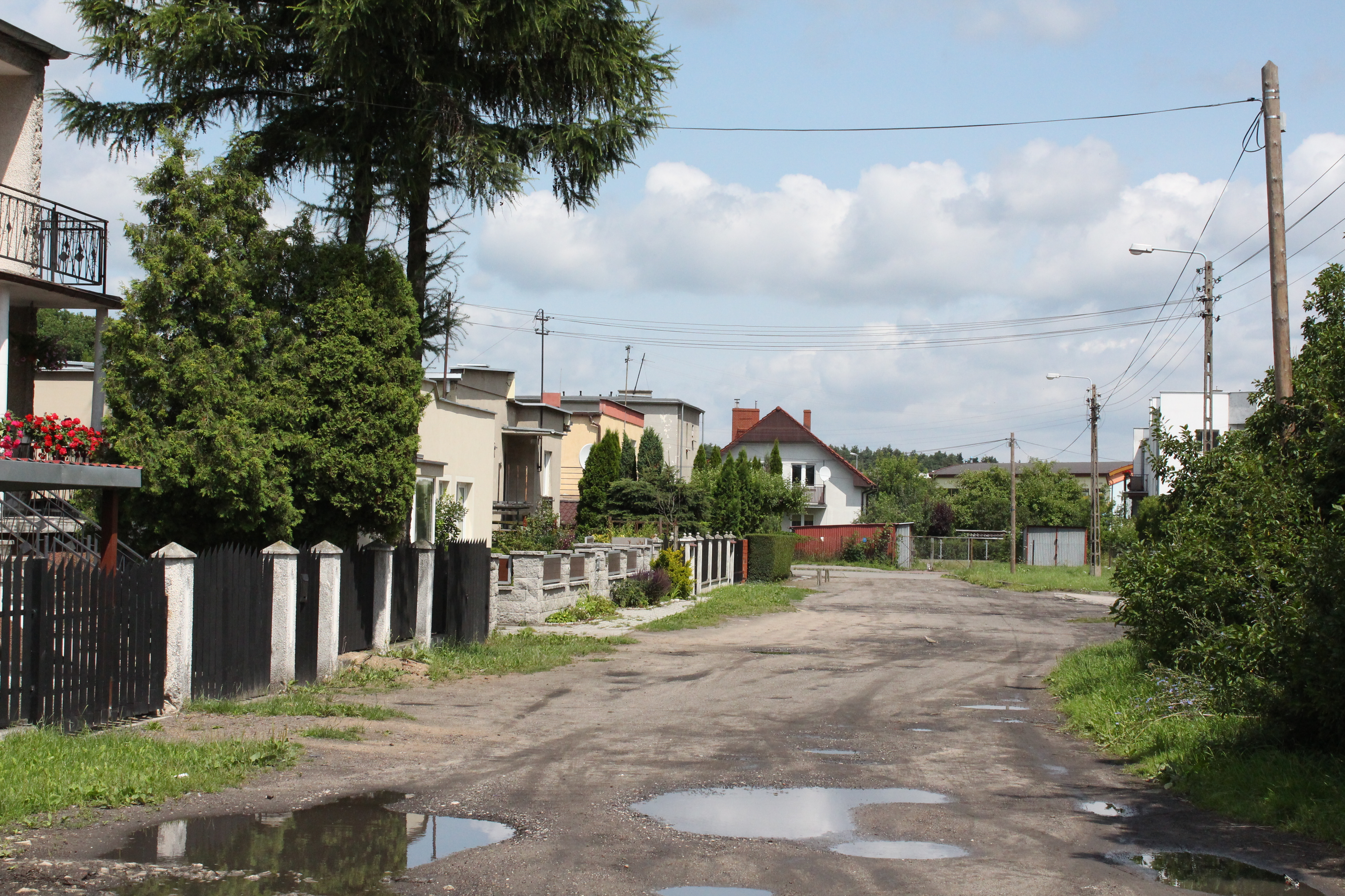 Osowa Góra, Bydgoszcz, Poland